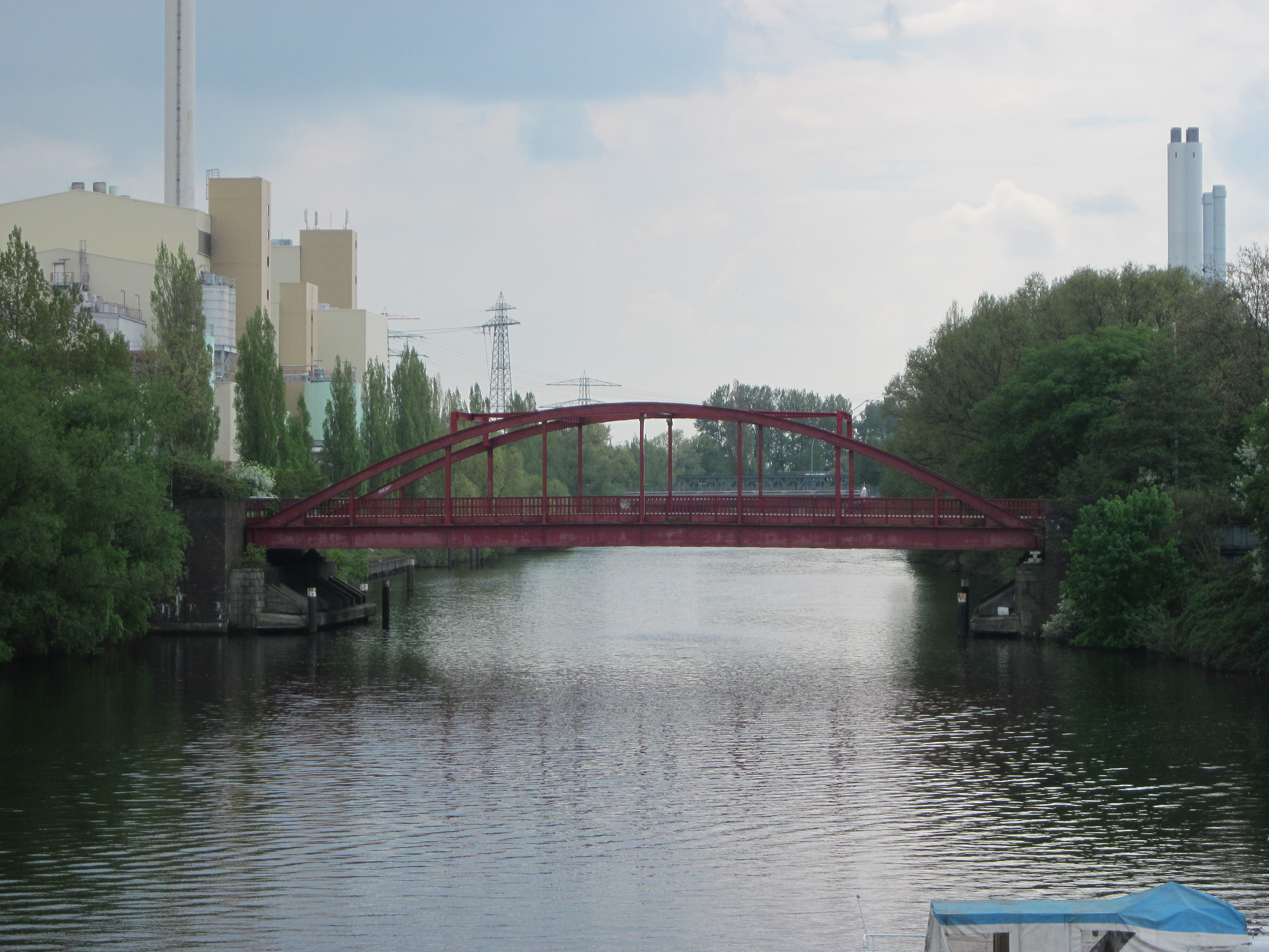 Blick von der Liebigbrücke auf die Borsigbrücke über den Tiefstackkanal in Billbrook.